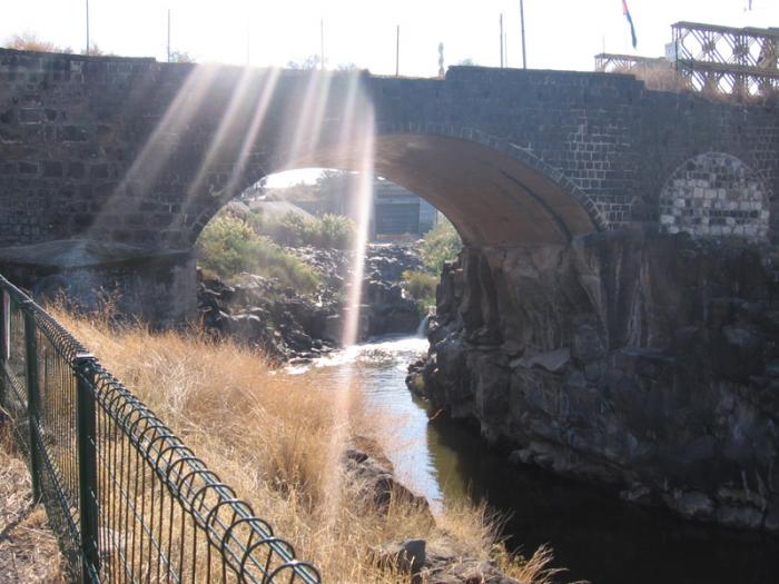 הגשר מעל הירמוך המוביל אל "אי-השלום", מעליו מעבר הגבול.